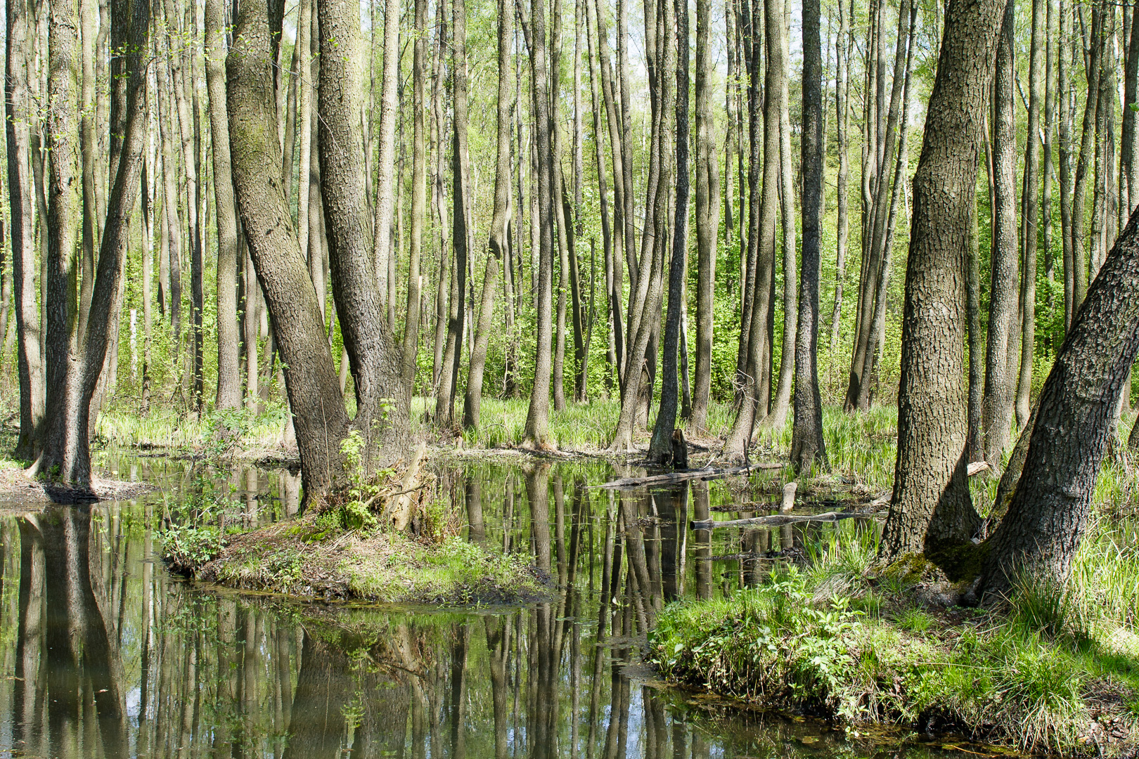 Olchy czarne i ols w rezerwacie Olszynka Grochowska przy Kanale Kawęczyńskim w pobliżu połączenia z Kanałem Rembertowskim oraz przepustu pod torami kolejowymi. Na pierwszym planie poprzerywany brzeg Kanału Kawęczyńskiego.